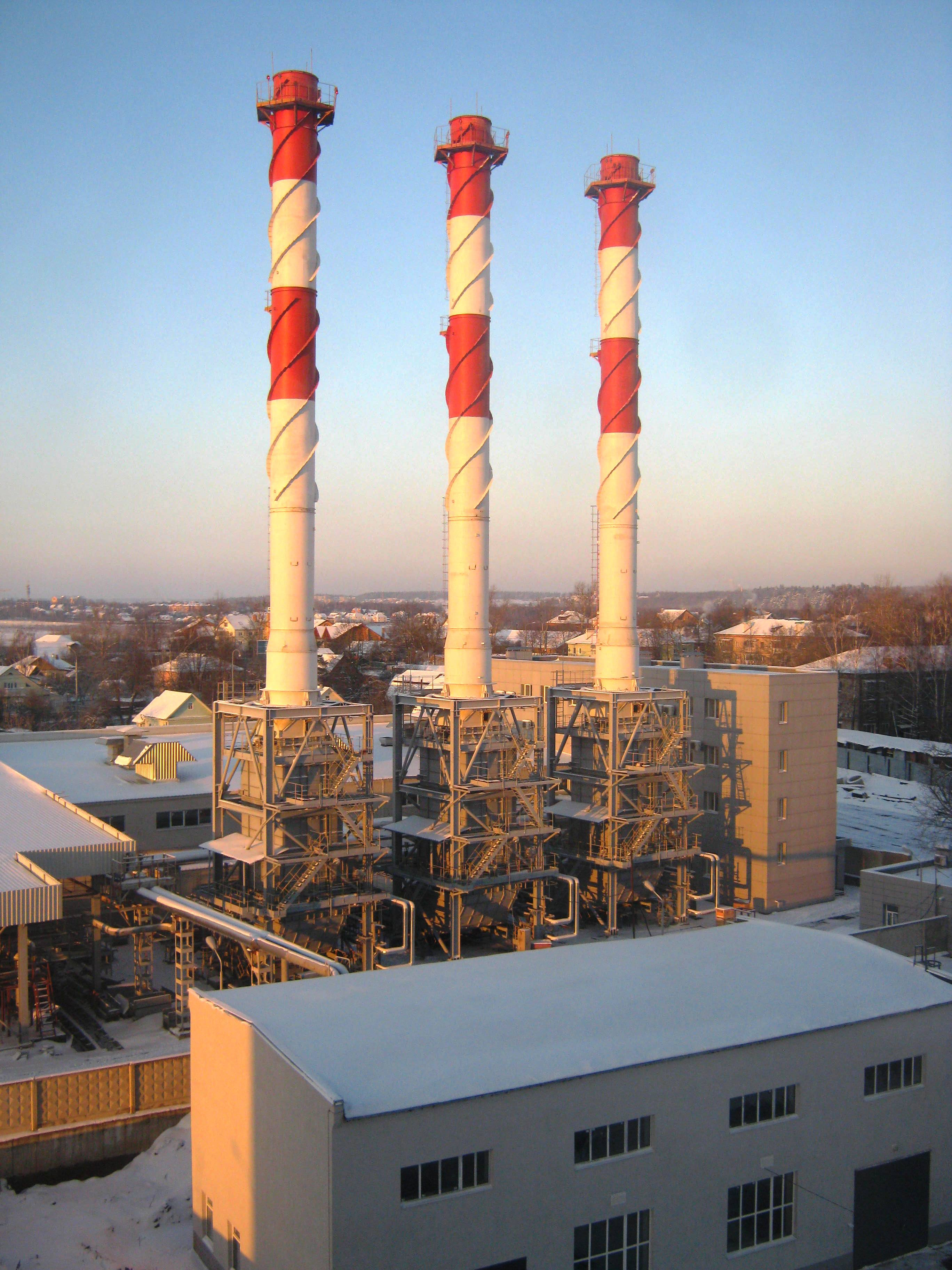 Котельная мкр. Восточный